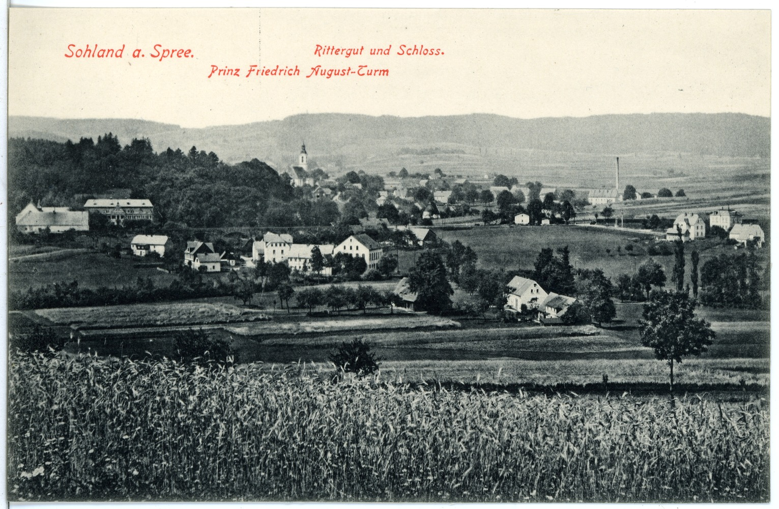 Sohland; Rittergut und Schloß, Prinz-Friedrich-August-Turm This postcard is from publisher Brück & Sohn in Meißen ( postcard has a unique number 19507 and is available in a higher resolution at the publisher. This images was uploaded in a cooperation project between Wikipedians and the publisher.